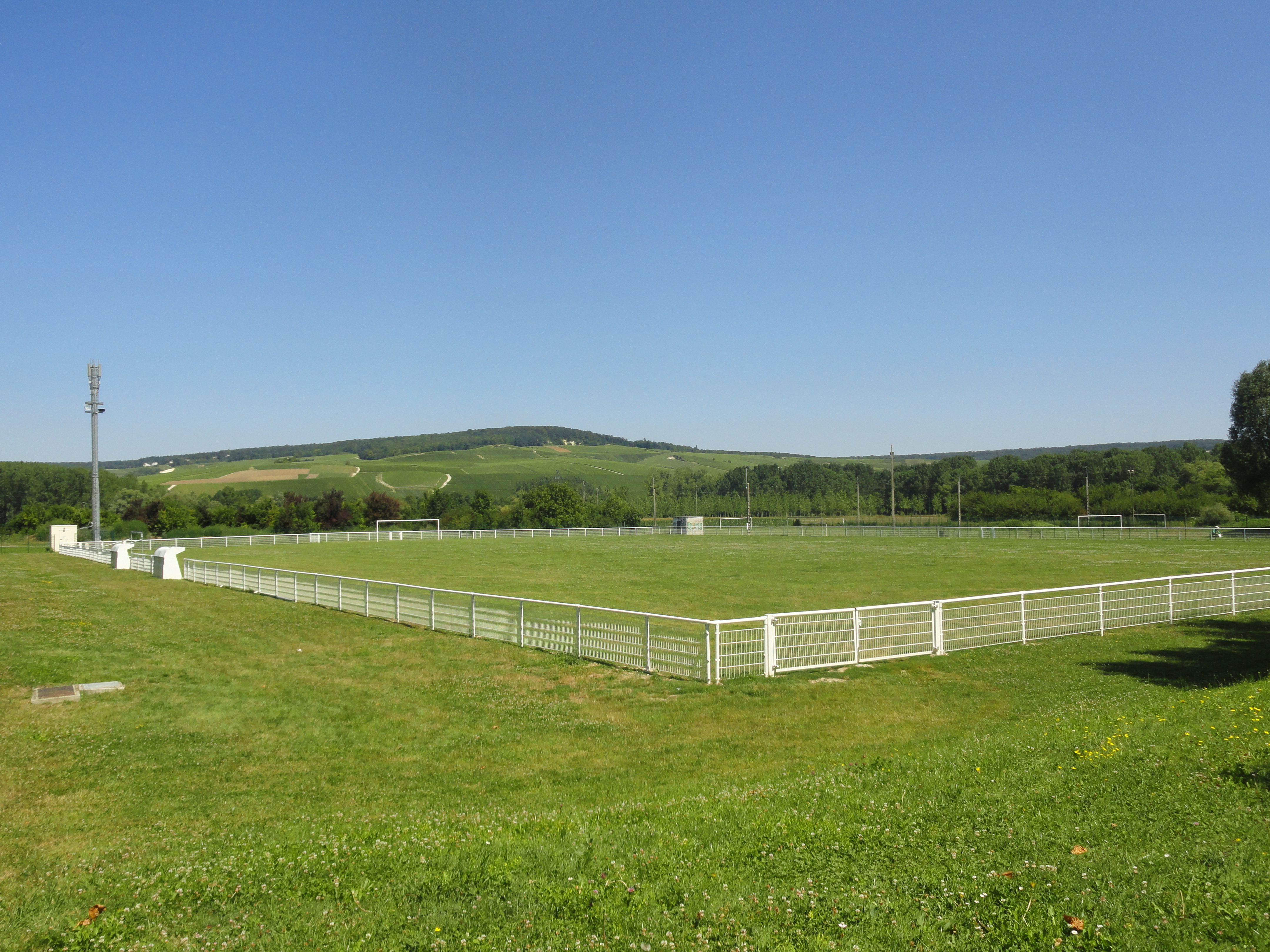 Terrain de football de Magenta (Marne).